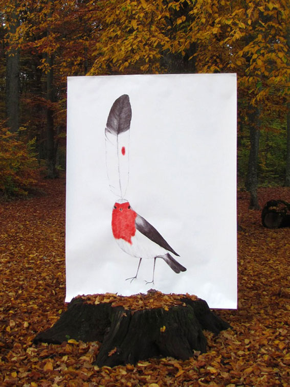 Dessin, stylo bille, peinture, 200 x 150 cm Aquisition de la ville de Nyon